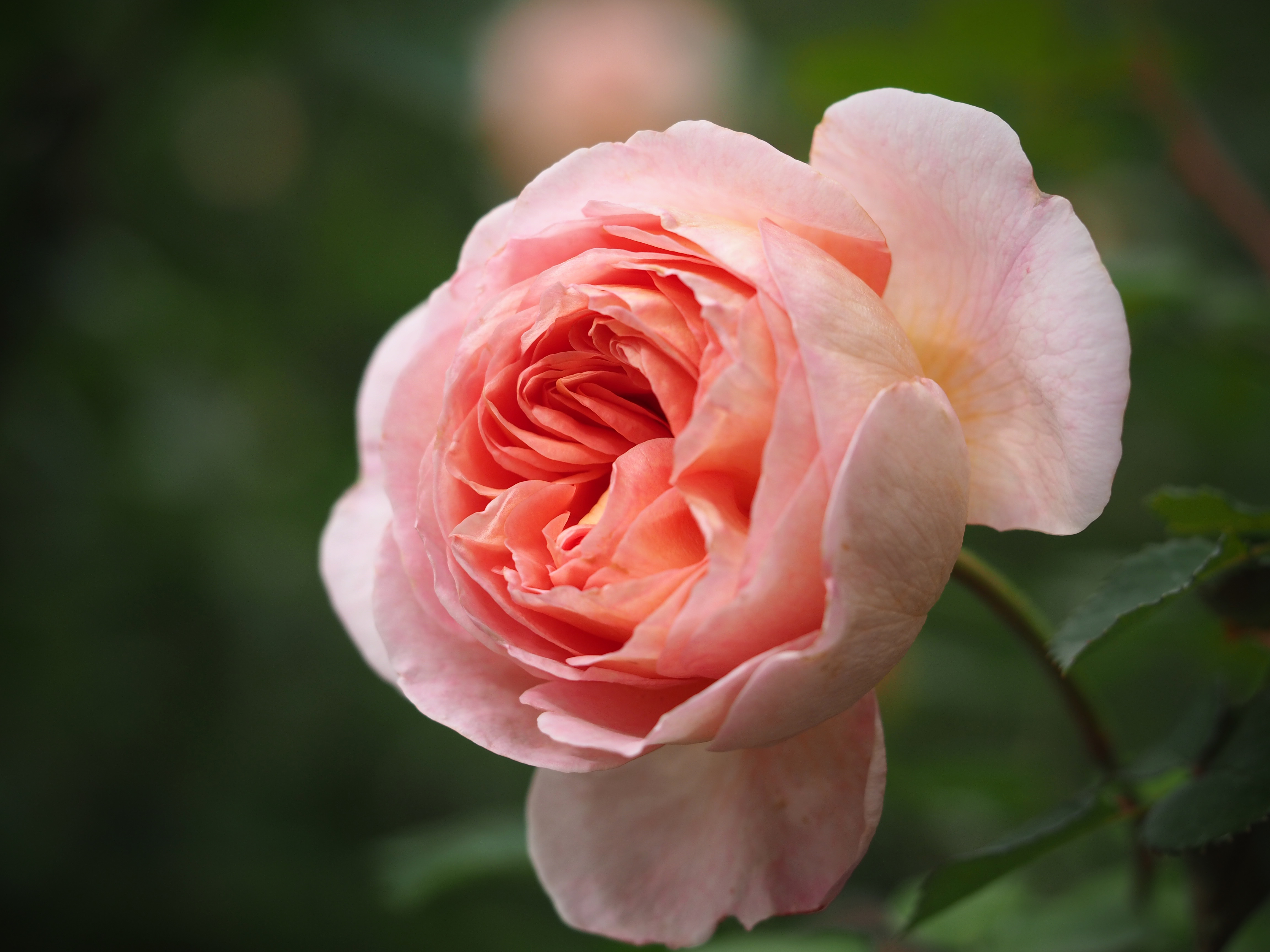 Rose, Abraham Darby, バラ, アブラハム ダービー, English Rose イングリッシュローズ United Kingdom イギリス Austin 1985